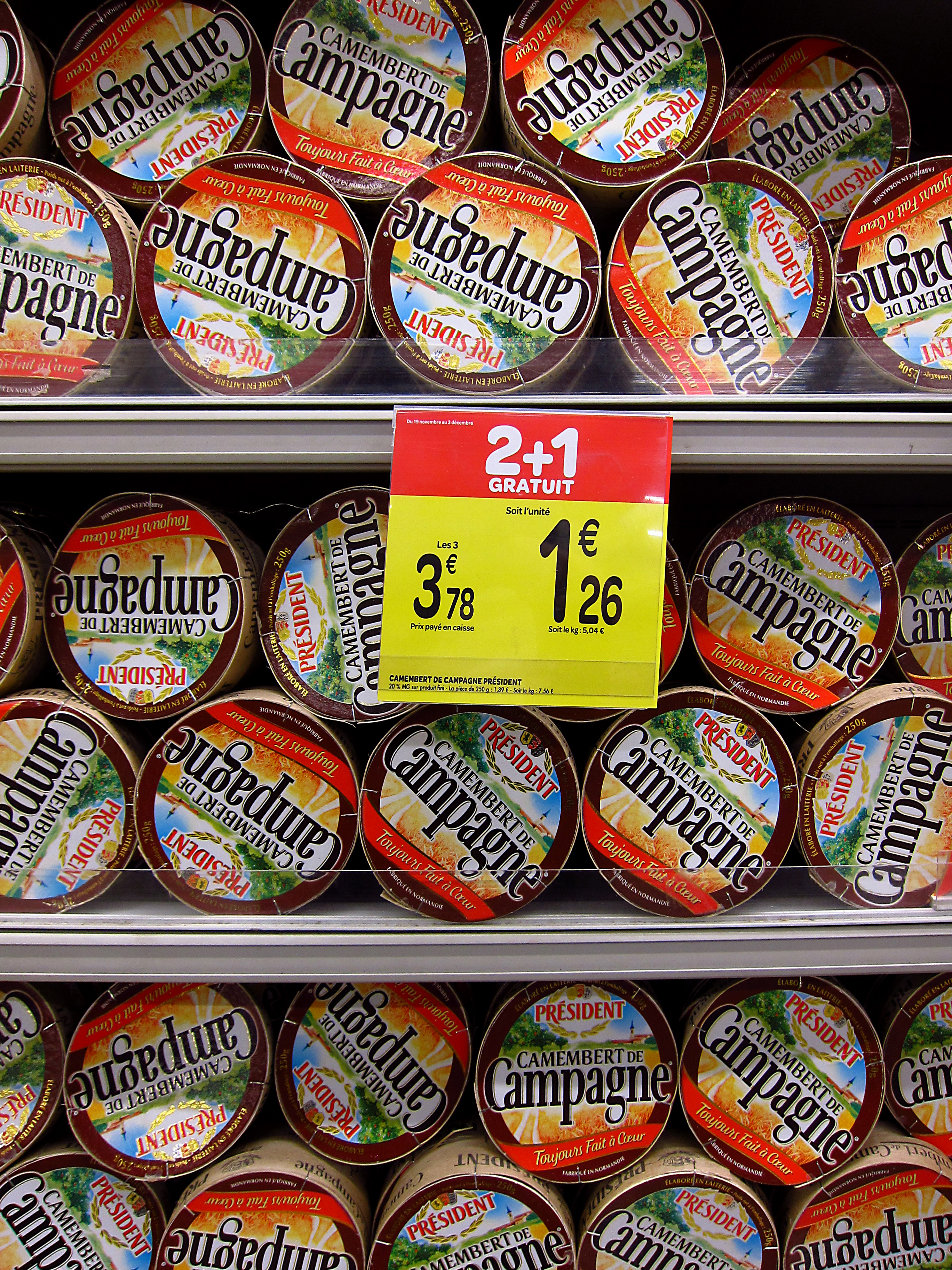 Épinay-sur-Orge (Essonne, Île-de-France, France) - Carrefour Market.